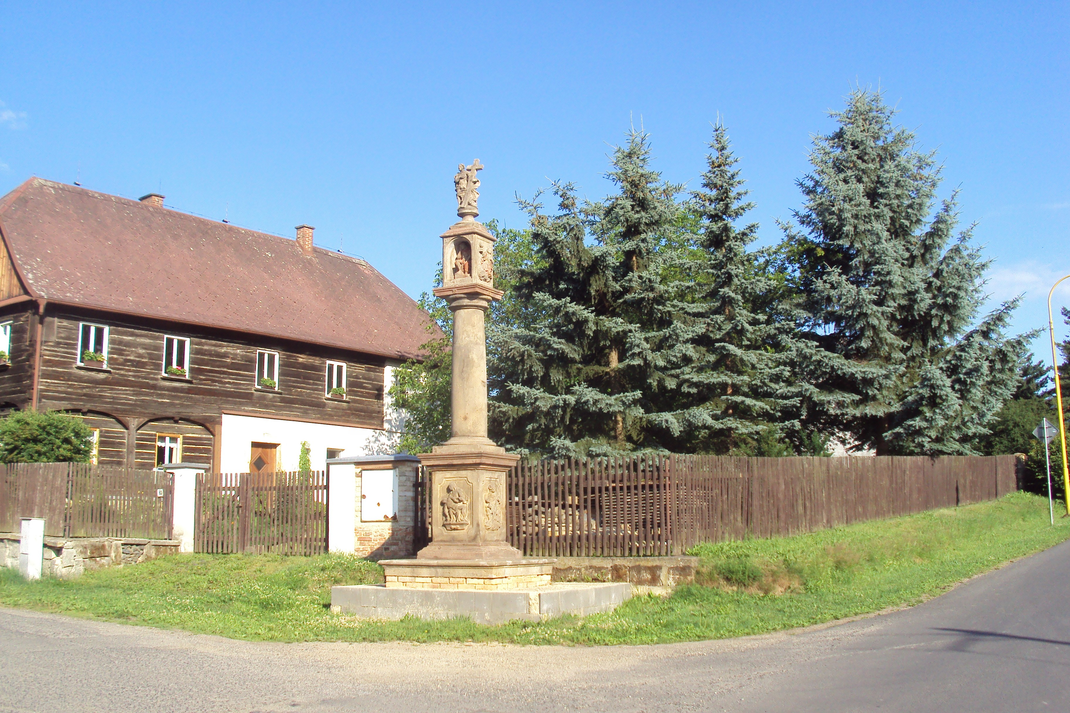 Boží muka v Skalici